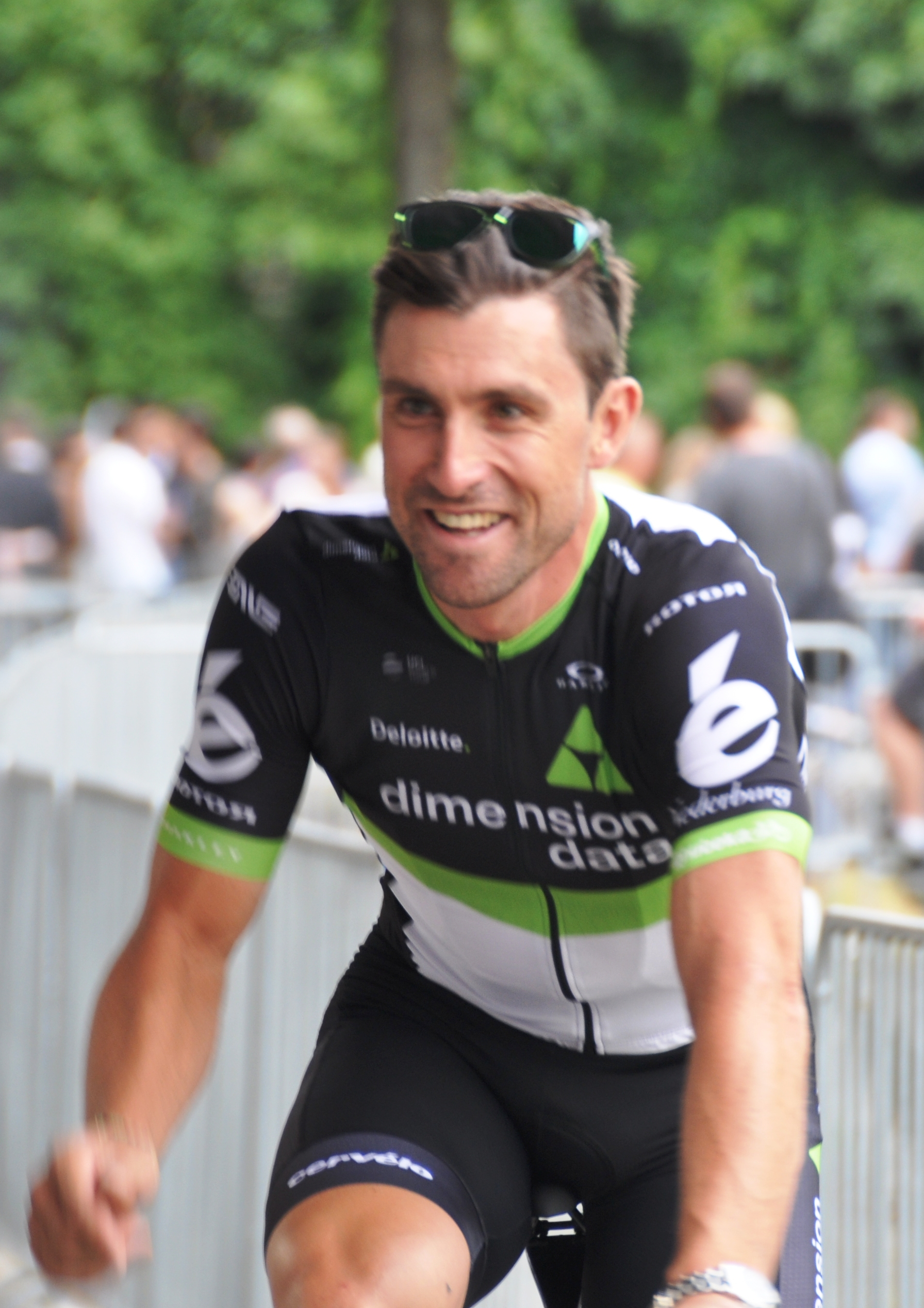 Bernhard Eisel, österreichischer Radrennfahrer